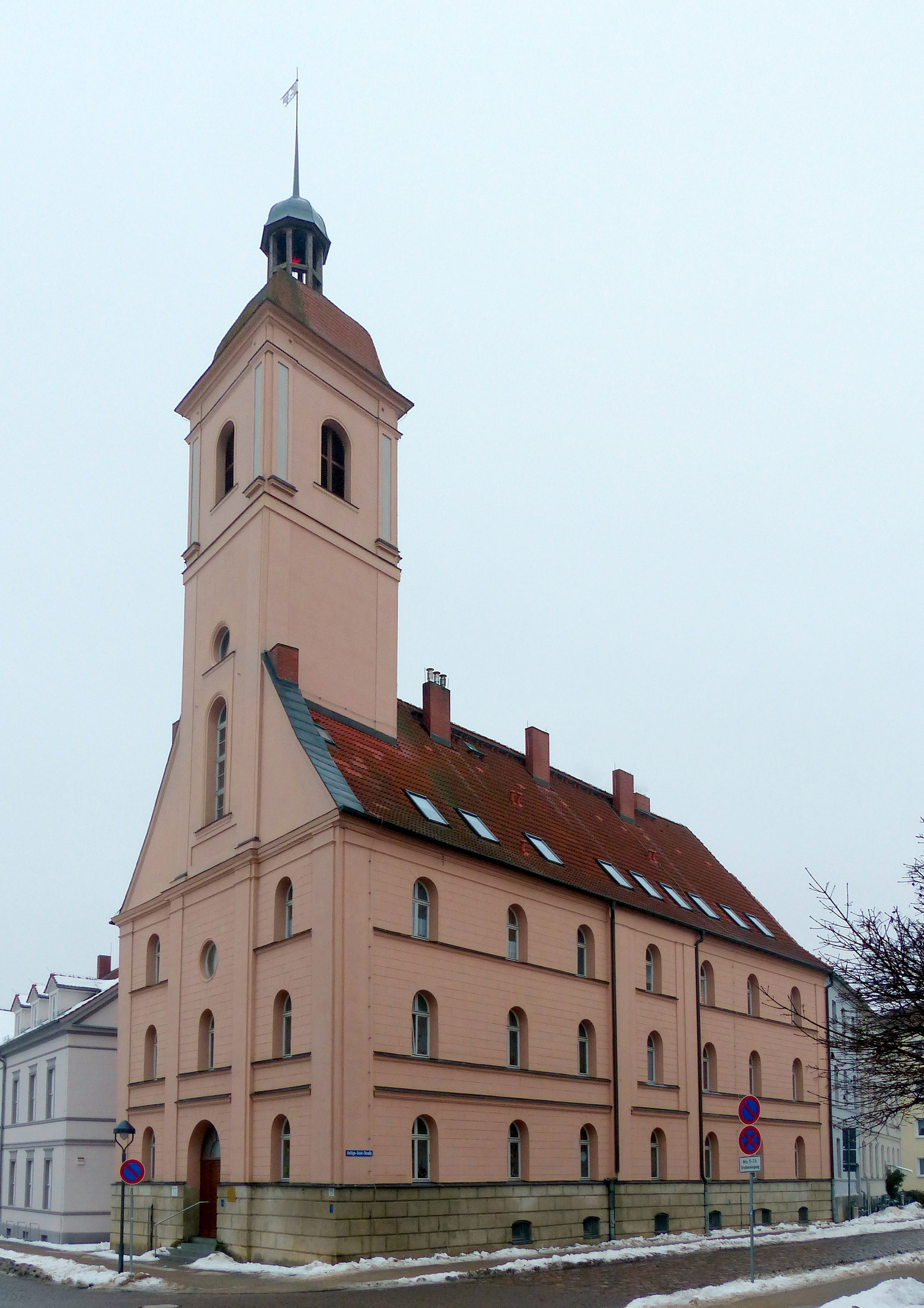 Anklam, Garnisonskirche, Gesamtansicht von südwest